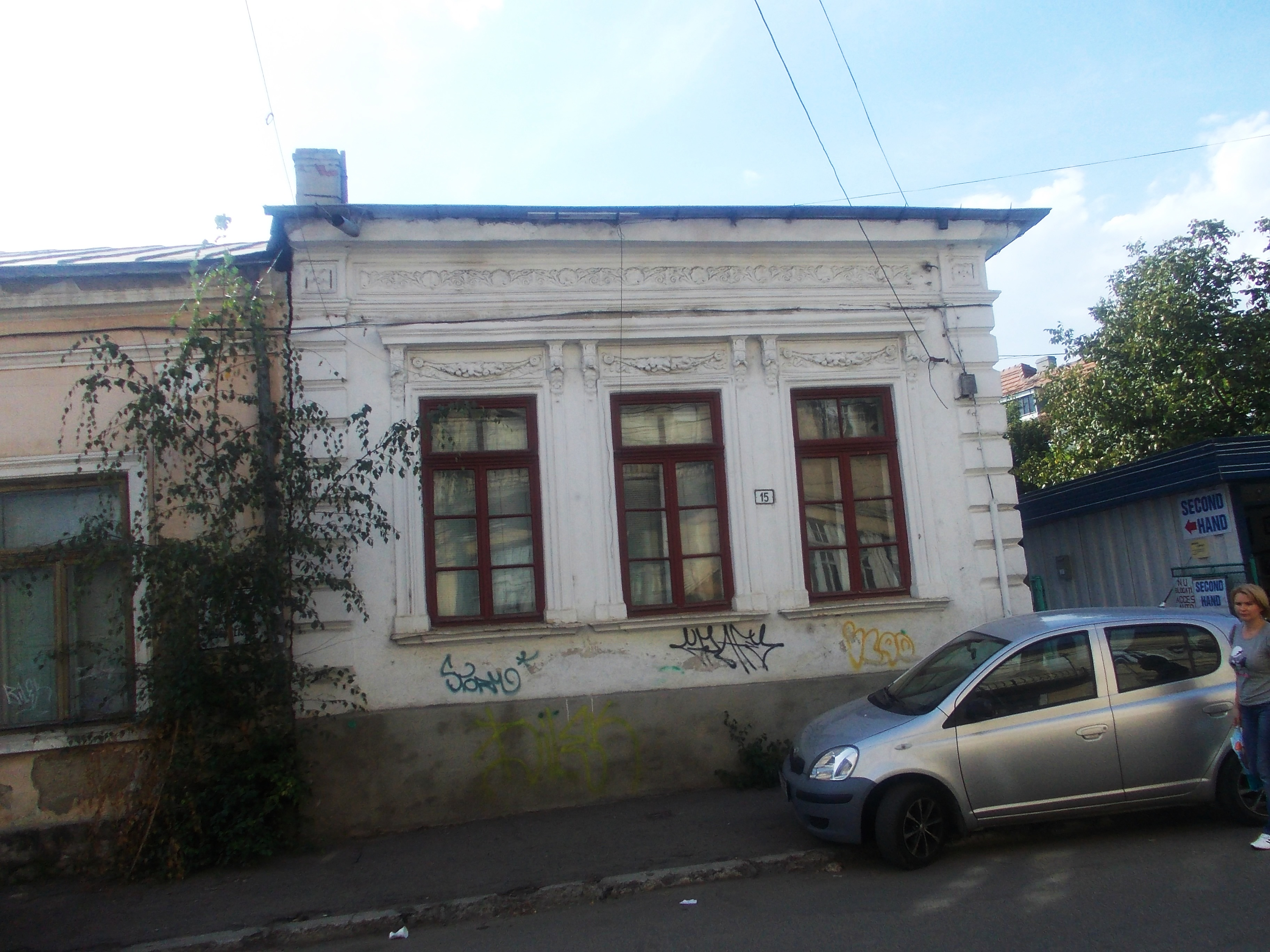 municipiul Iași, Str. Bârsescu Agatha 15